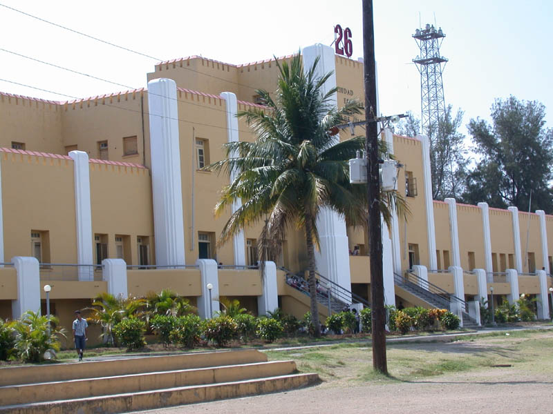 Moncada-Kaserne im Mai 2003. Moncada-Kaserne vom Exerzierplatz